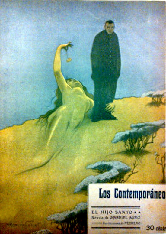 Portada de El hijo santo.